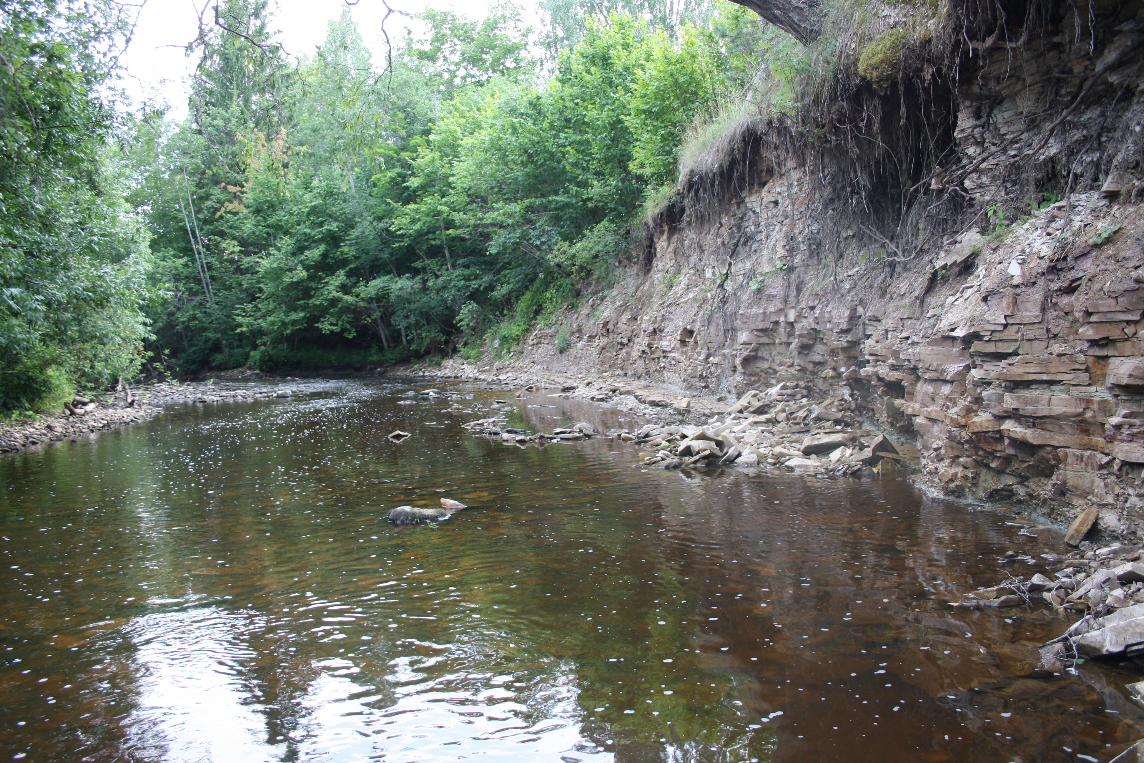 Kalkahju paljand.